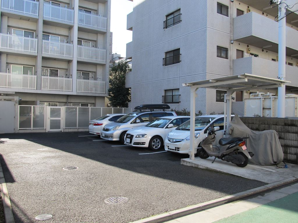 集合住宅の駐車場。四輪車。二輪車。